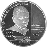 монета Чайка Дніпрова реверс: монета Чайка Дніпрова реверс